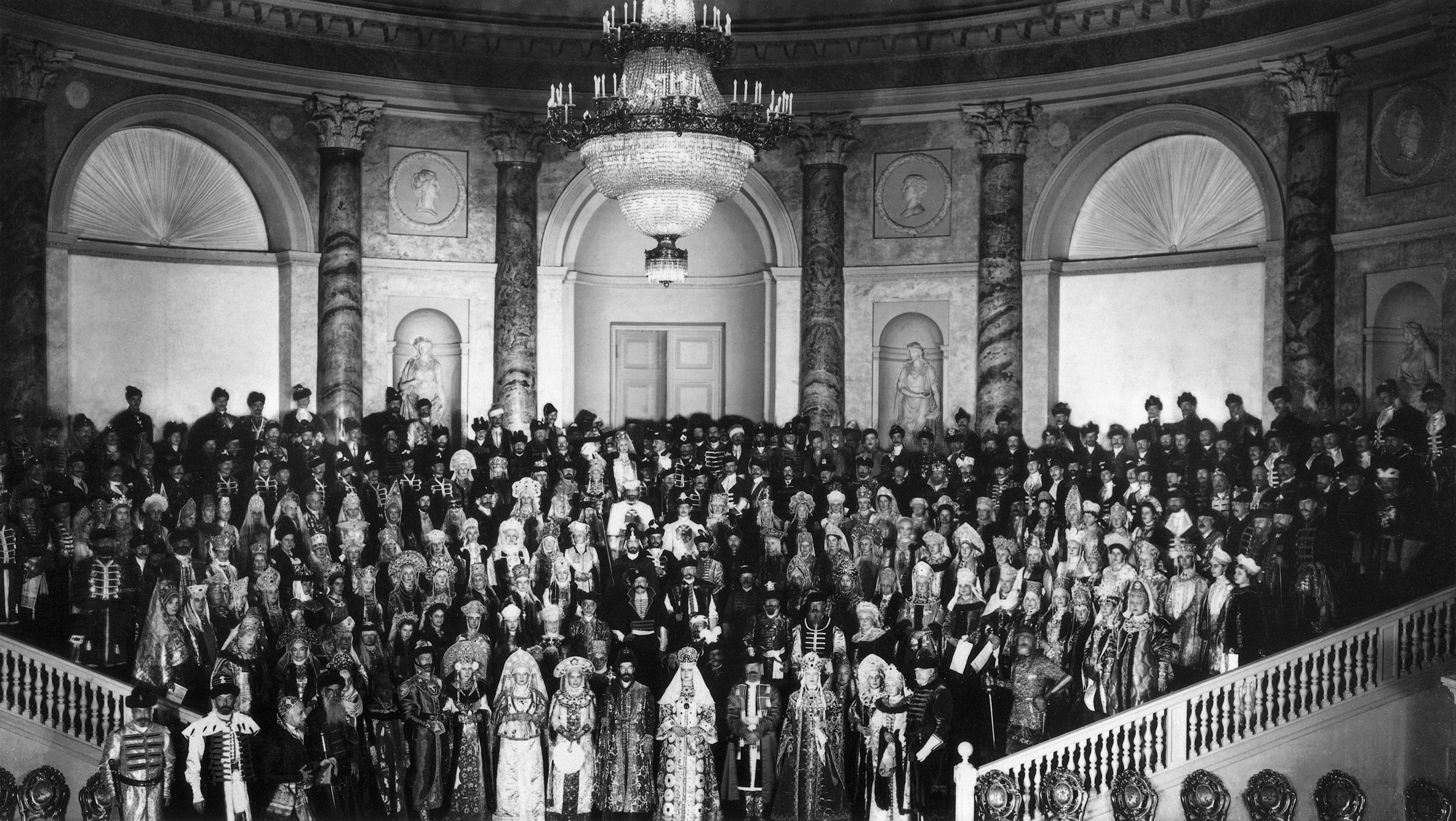 Фотография 1903 года, СПб. Великосветский костюмированный бал в Эрмитажном театре Зимнего дворца. Общее фото.